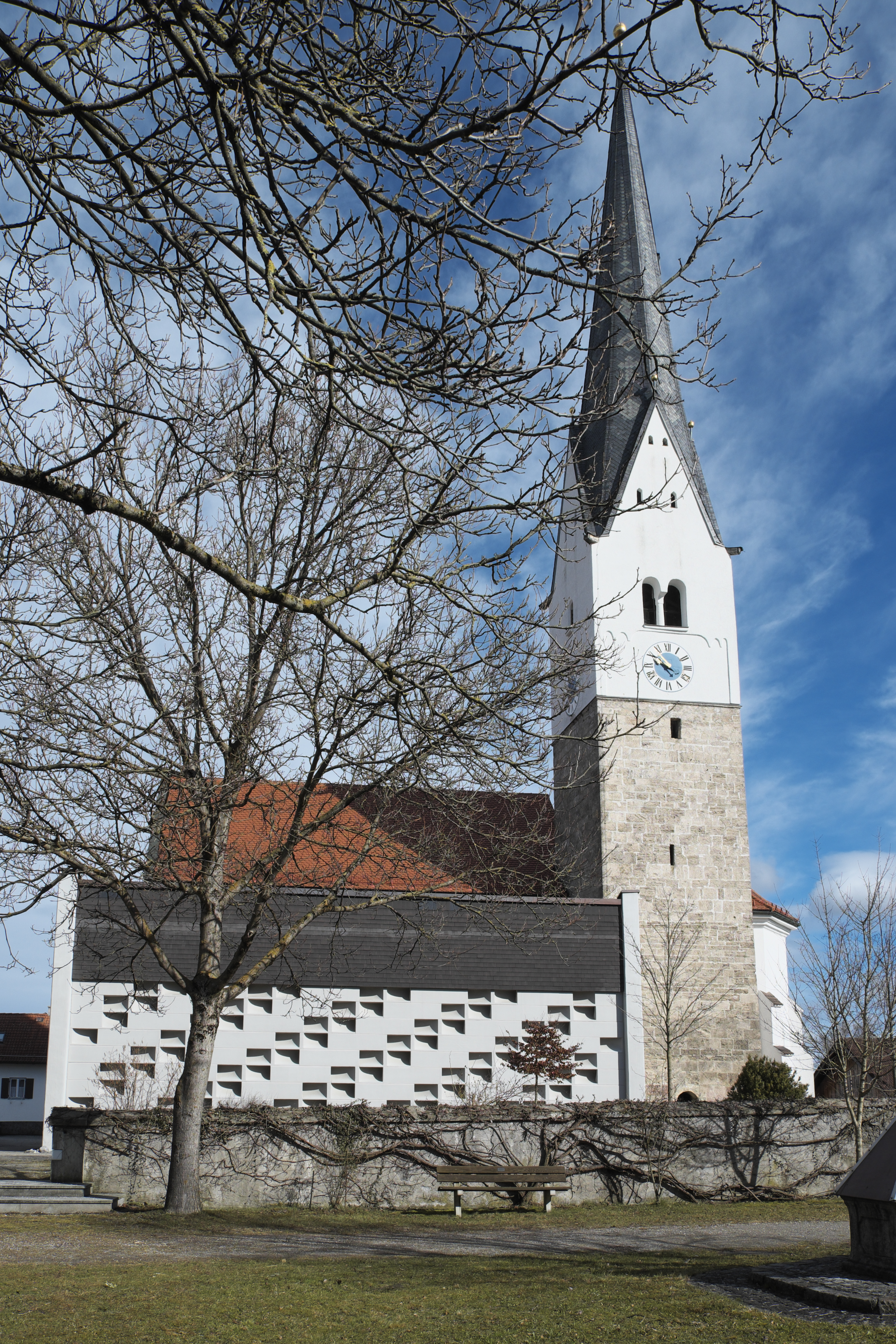 Katholische Pfarrkirche St. Peter in Wielenbach im Landkreis Weilheim-Schongau (Bayern/Deutschland)